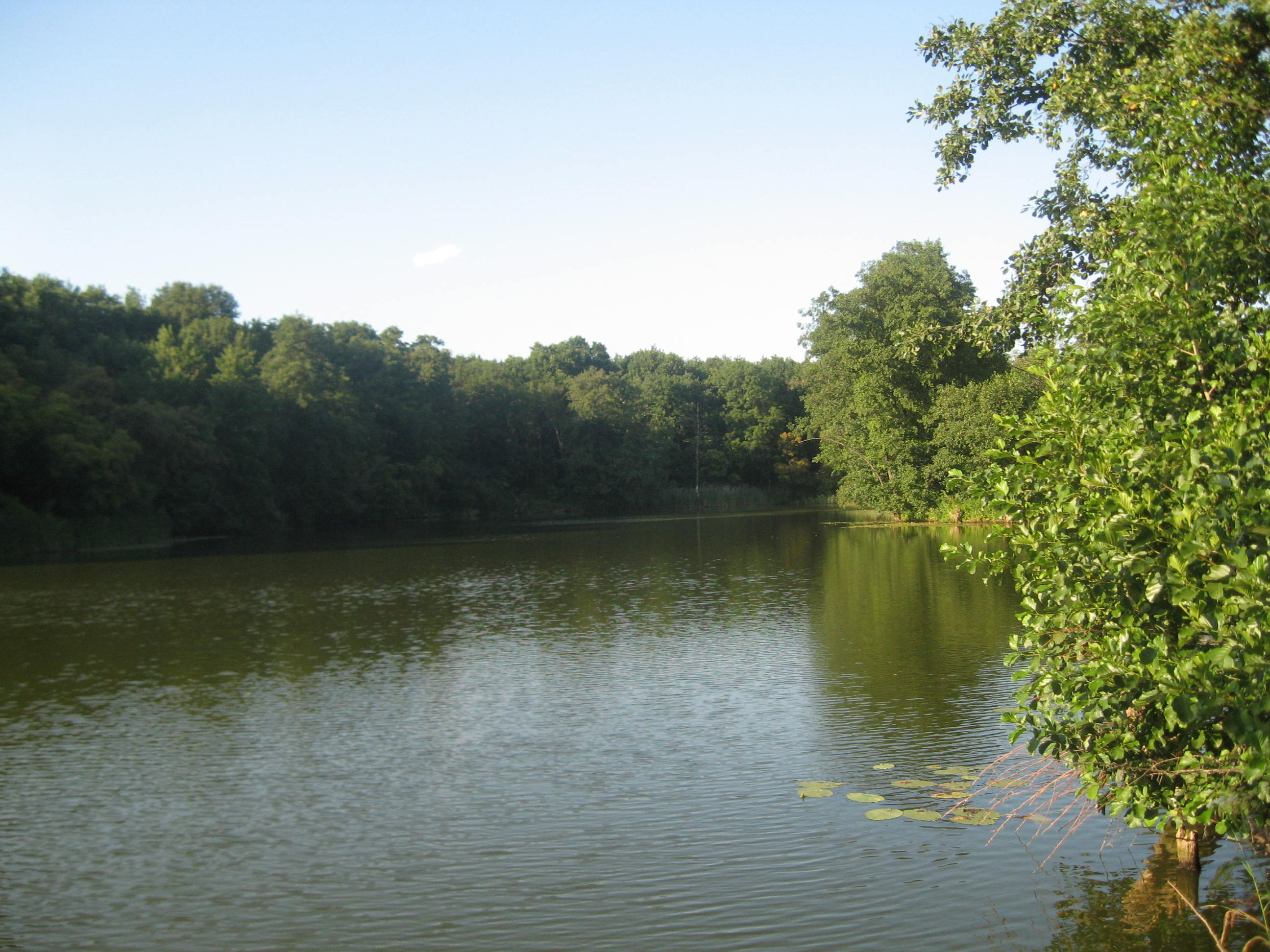 Видна река.